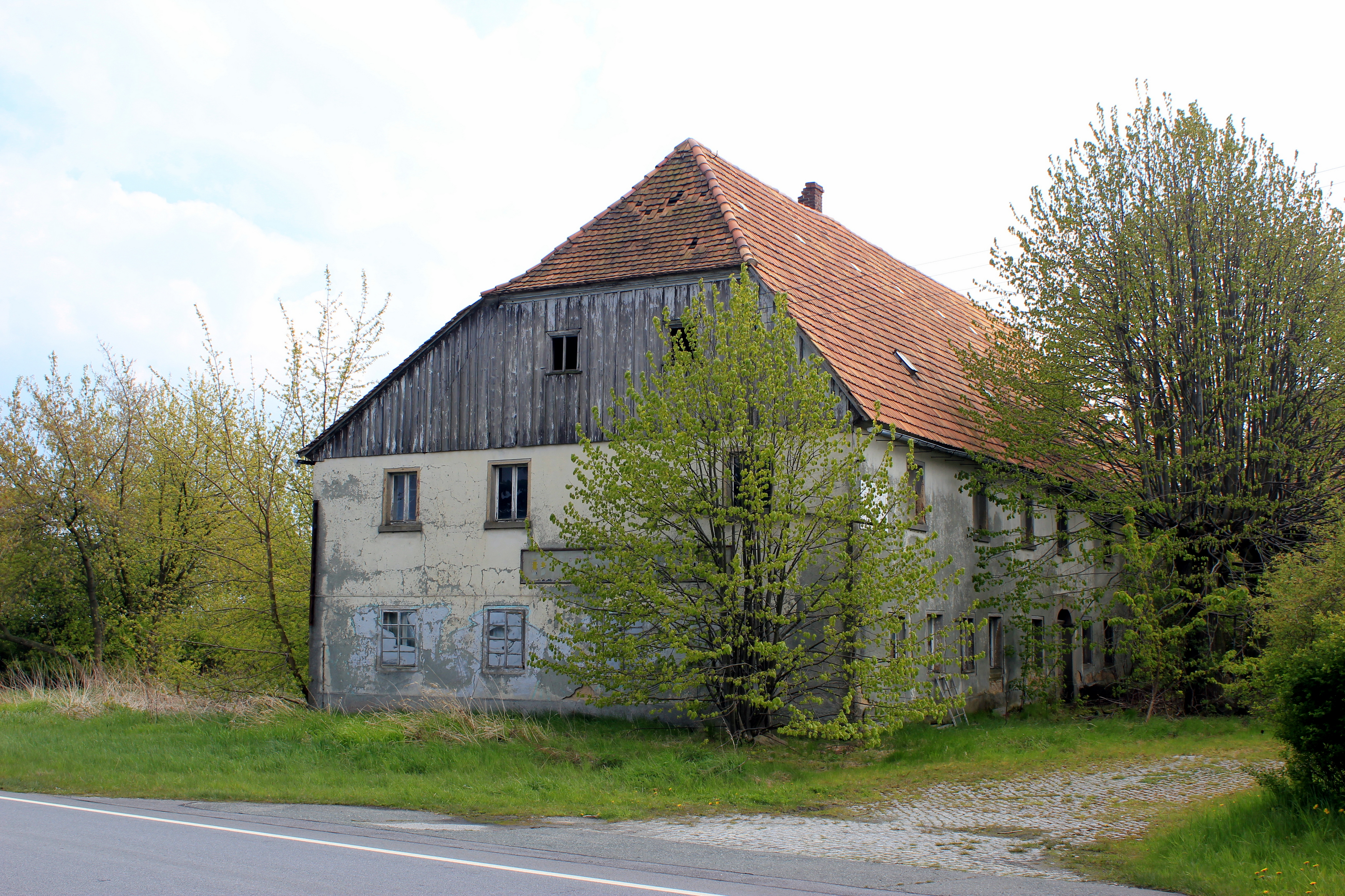 Hornjoserbsce: Něhdyši Mikanec hosćenc "Buenos Aires" w Njeznarowach pola Lubija.